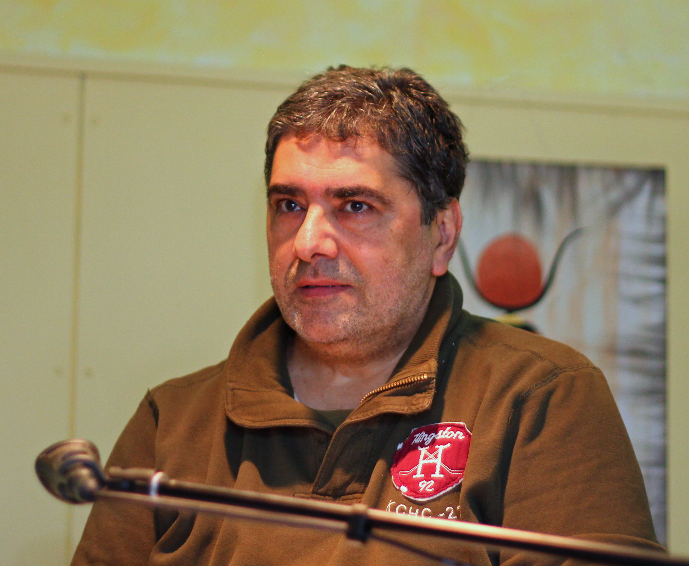 Schriftsteller Jovan Nikolić liest vor Schülern in Köln